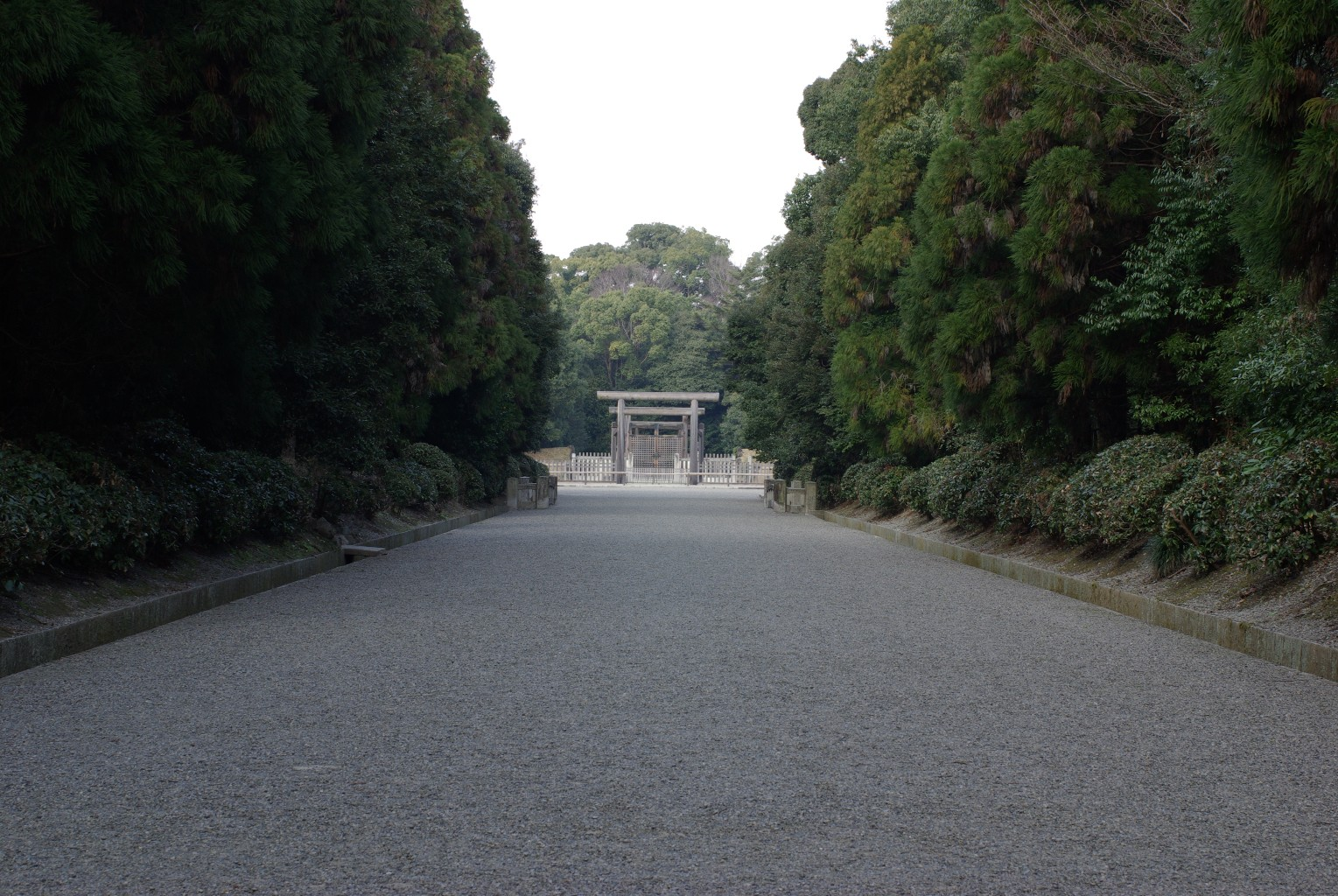 神武天皇陵への道。奈良県橿原市